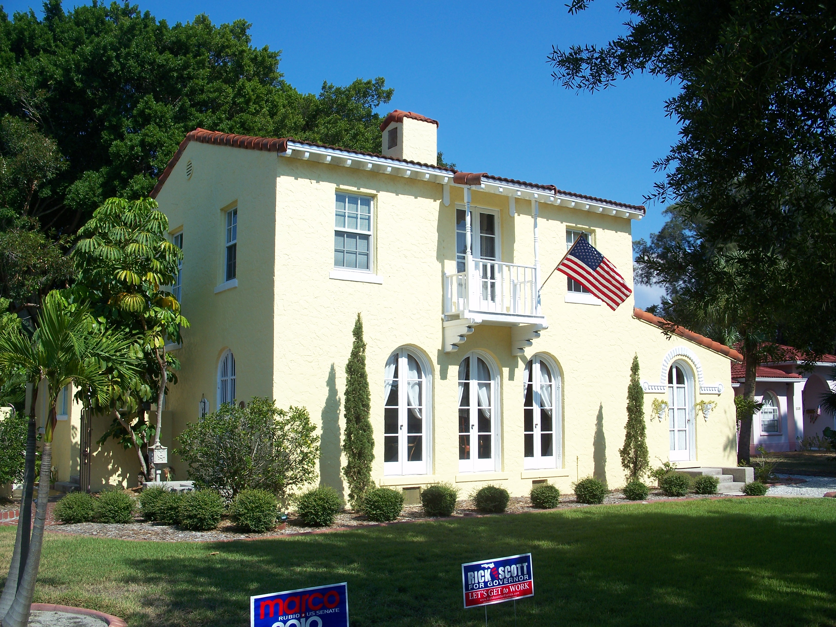 Venice, Florida: Venezia Park Historic District